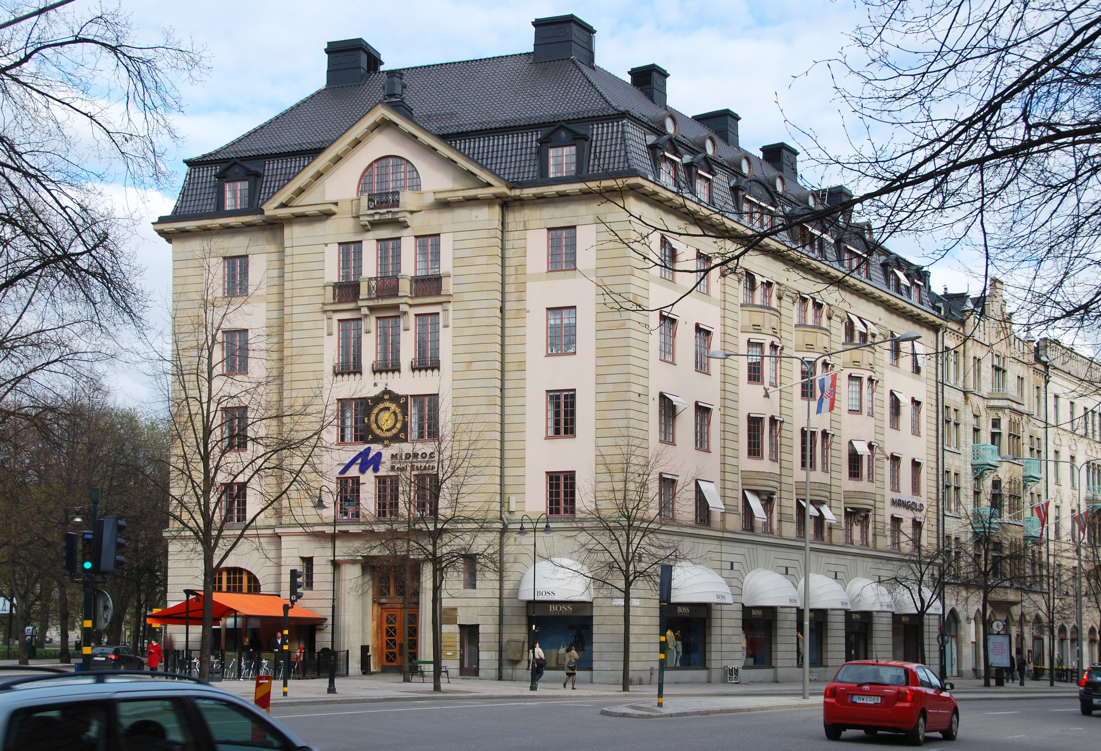 Engelbrektsplan 2. Byggt 1914-1915.